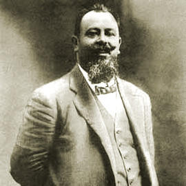 Giovanni Montemartini